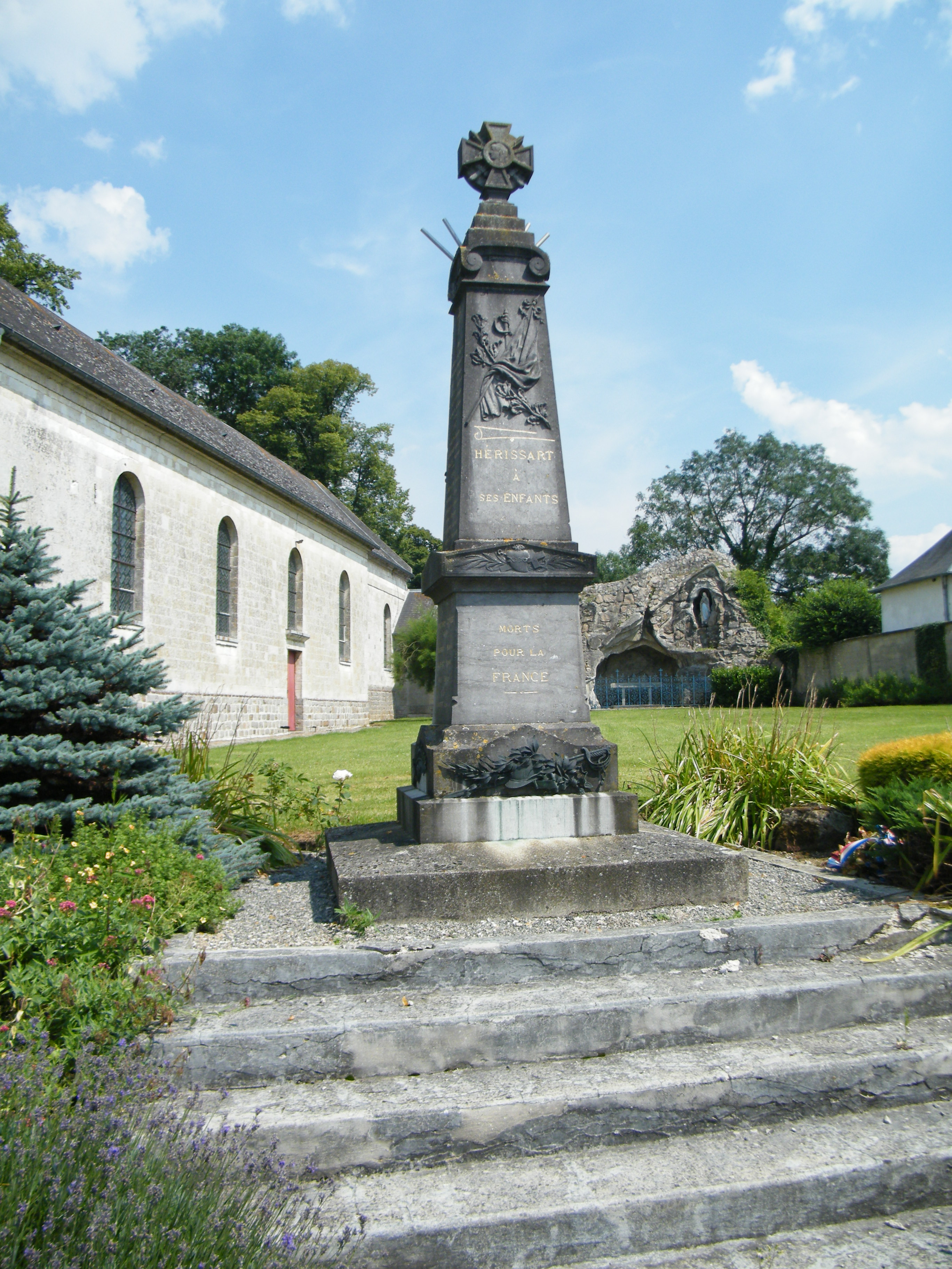 Monument aux morts pour la patrie.